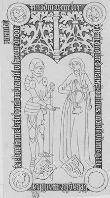 Grabstein des Ulrich II. von Maltzan und seiner Frau Beate, geb. von Vieregge Datum: 1459 Urheber: Nachkommen des Ulrich II. von Maltzan Quelle: Grabstein in der Pfarrkirche von Grubenhagen